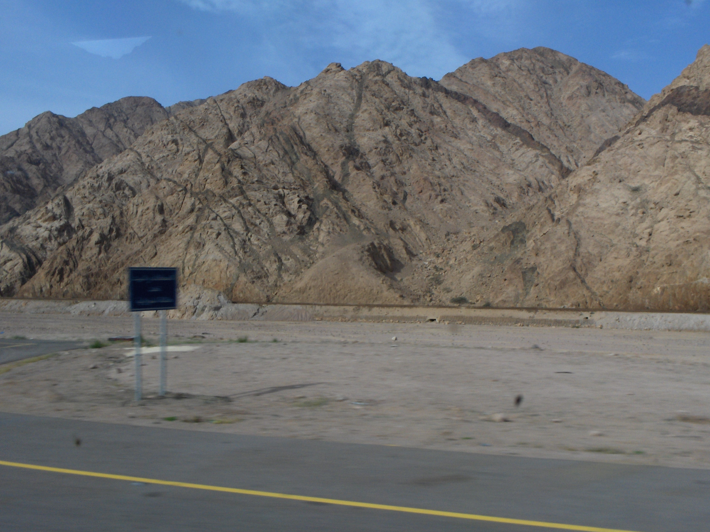 I monti a nord di Aqaba